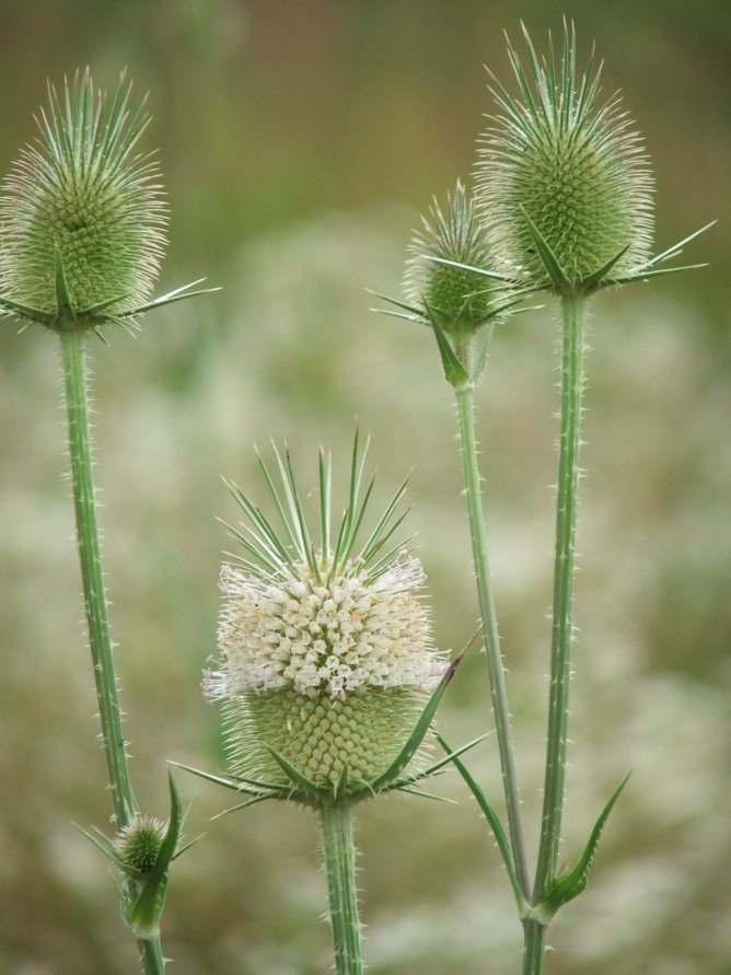 Mácsonyák